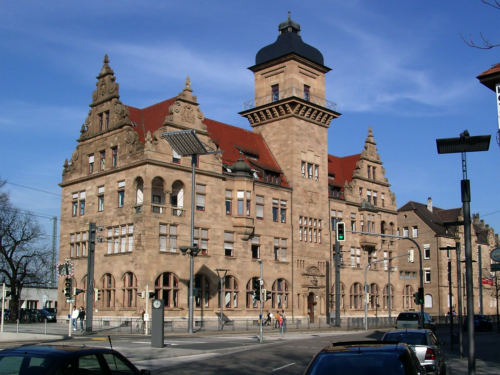 Heilbronn, altes Postamt No.2 neben dem Bahnhof